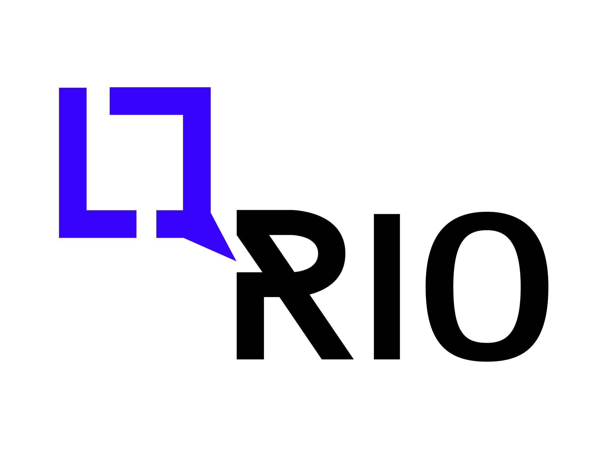 RIOs offisielle logo siden 2016